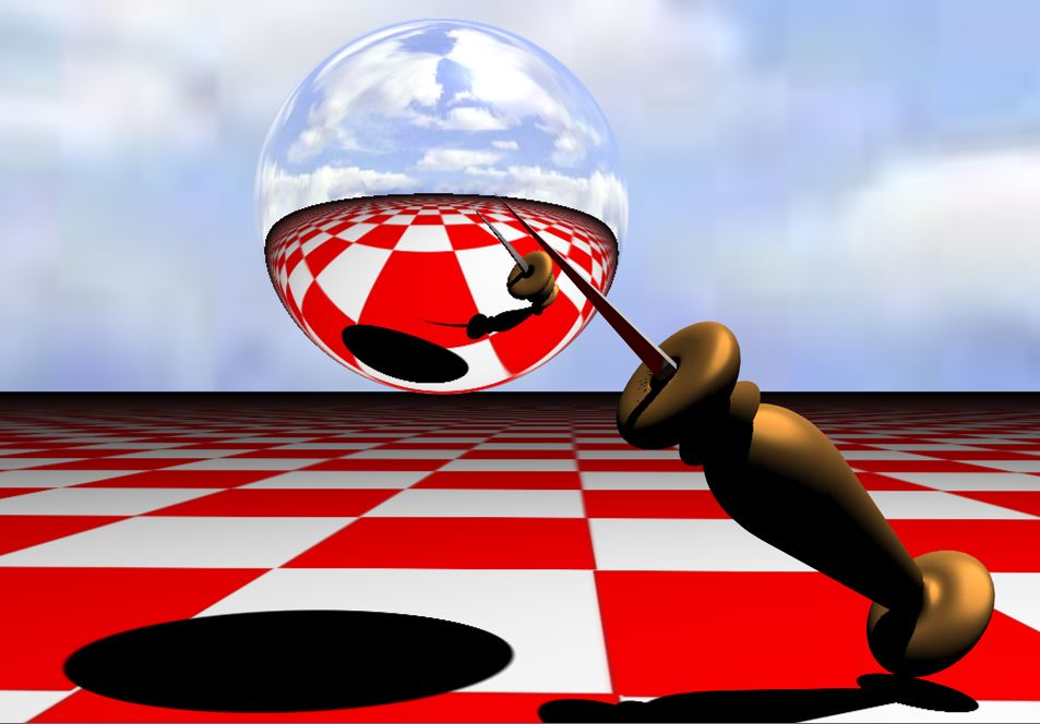 Bilboquet pour donner du sens à la sphère